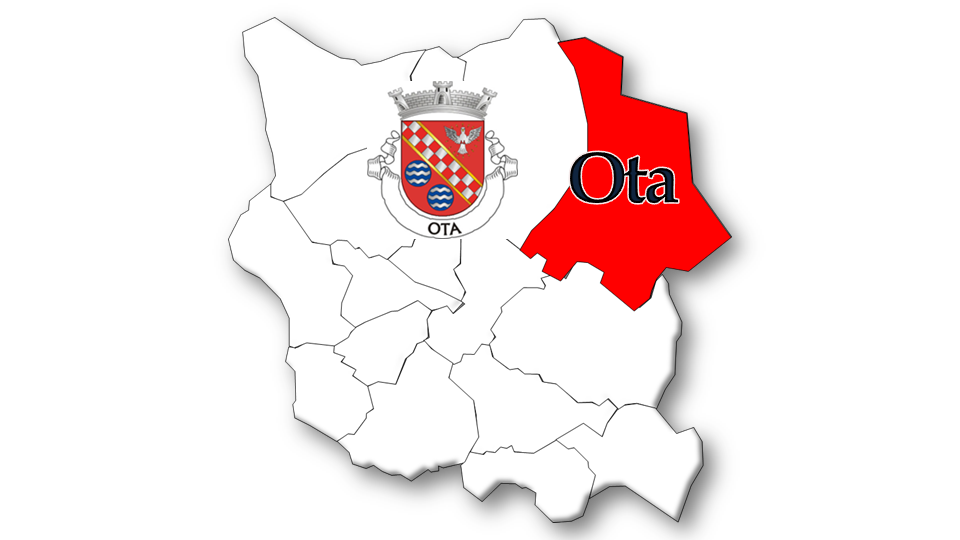 Evolução da População